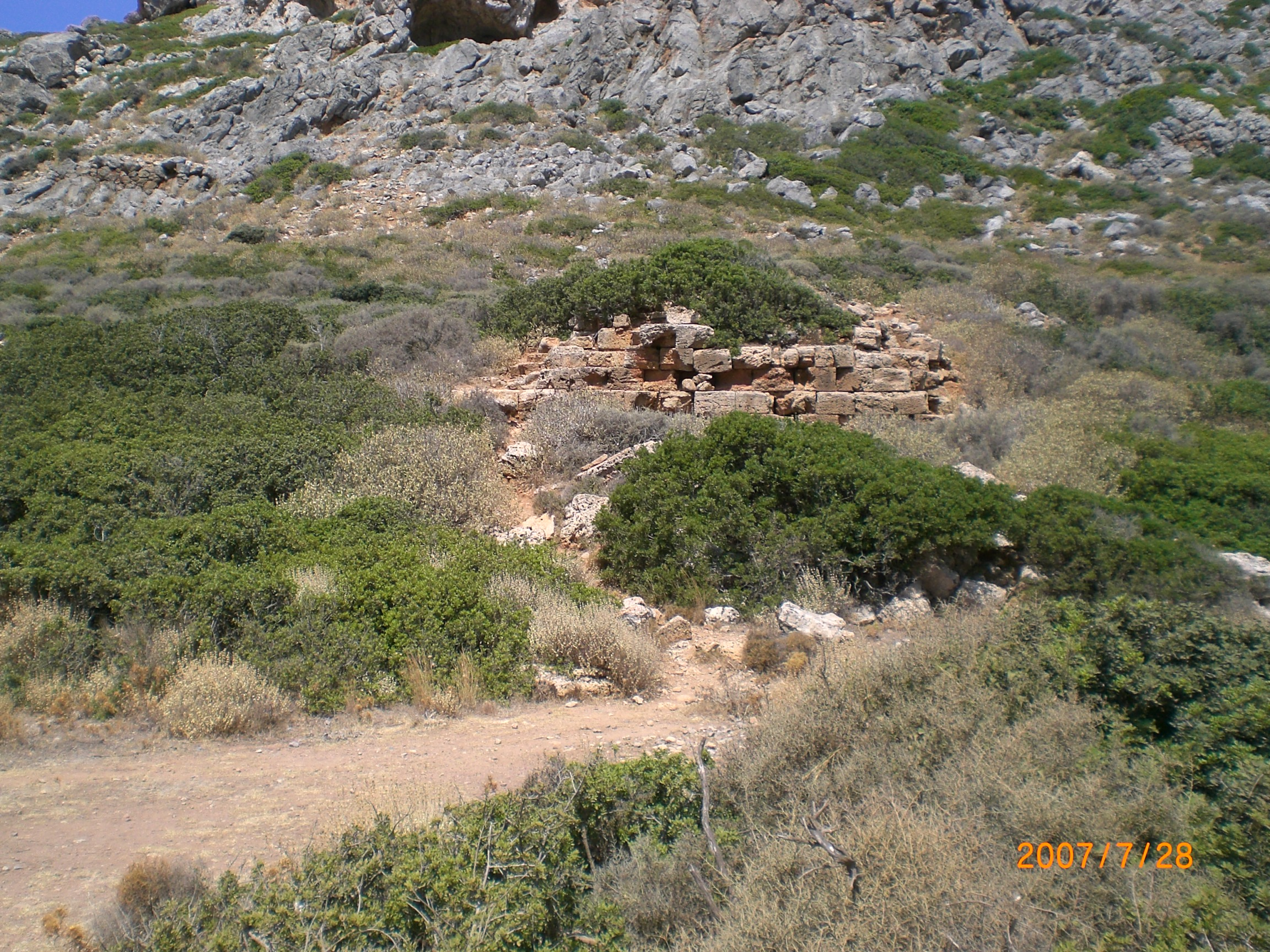 falasarna